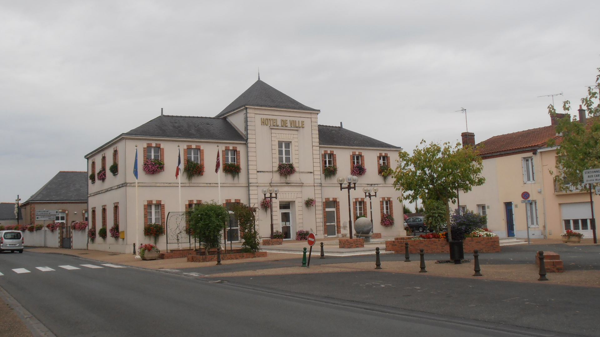 La mairie de Saint-Laurent-des-Autels (Maine-et-Loire, France).